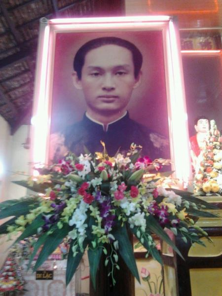 Chân dung Huỳnh Giáo Chủ tại chánh điện chùa An Hòa Tự (TT.Phú Mỹ, Phú Tân, An Giang)